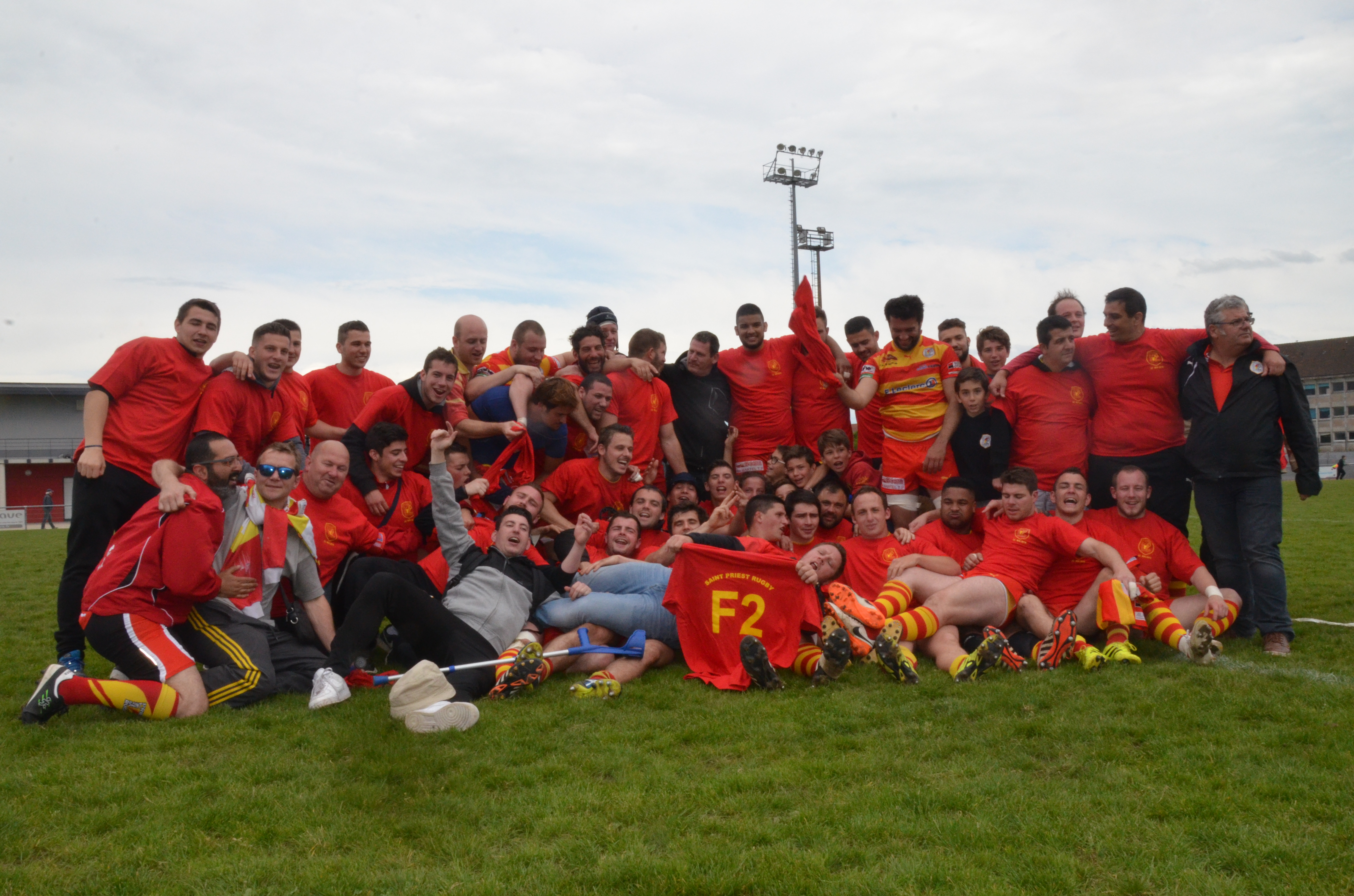 Photo de liesse entre les joueurs à la fin du match